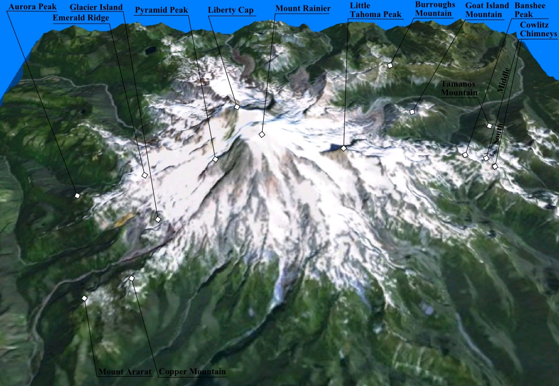 Muntele Rainier de langa Seattle, SUA. Prelucrare 3D cu date SRTM de la NASA.